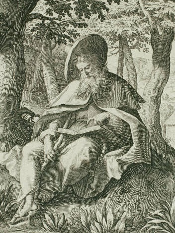 St. Disibod, gestochen von Raphael Sadeler (1561-1616) nach Gemälde von Marten de Vos (1532-1603)